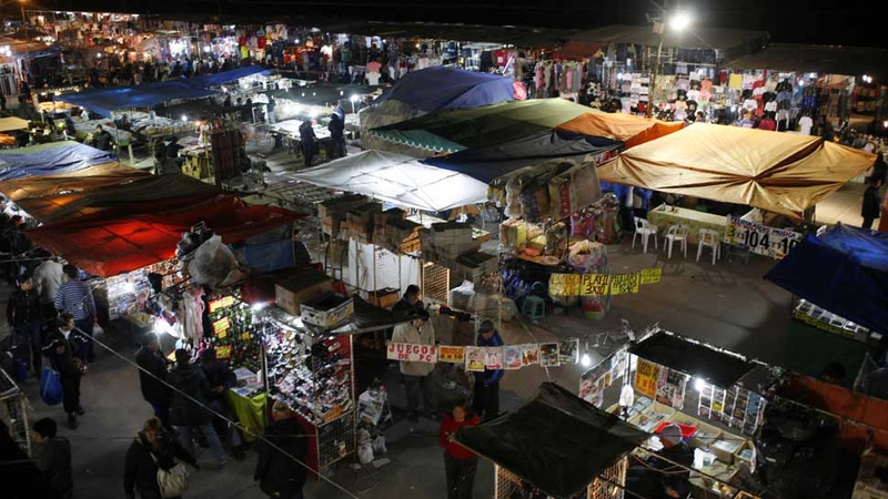 Mercado La Salada. Partido de Lomas de Zamora. Gran Buenos Aires. Argentina.